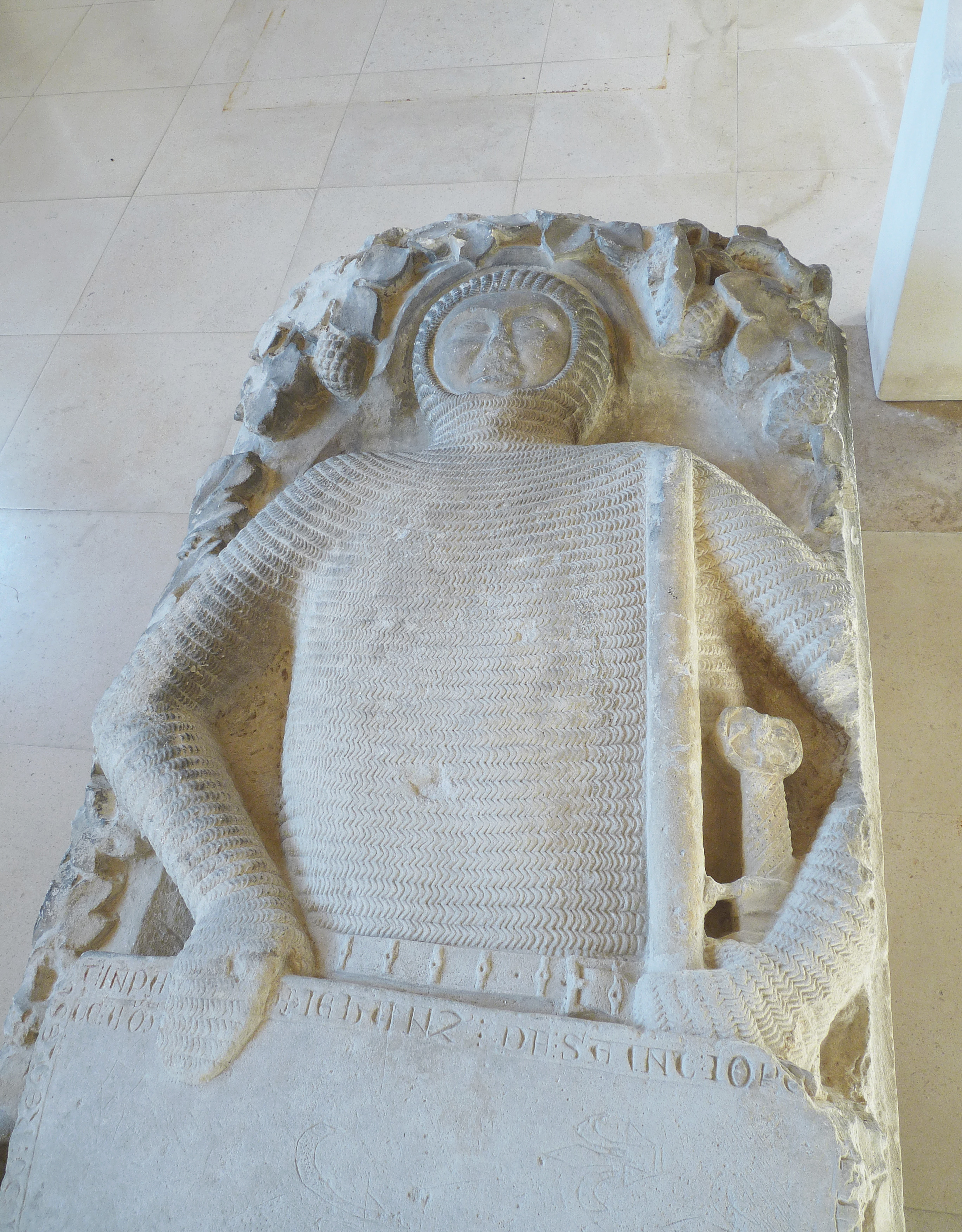 Pierre tombale (détail) de Guy de Sailly, seigneur de Joinville. Pierre calcaire, XIIIe s. Provient de l'ancienne abbaye d'Ecurey. Musée barrois (Bar-le-Duc)